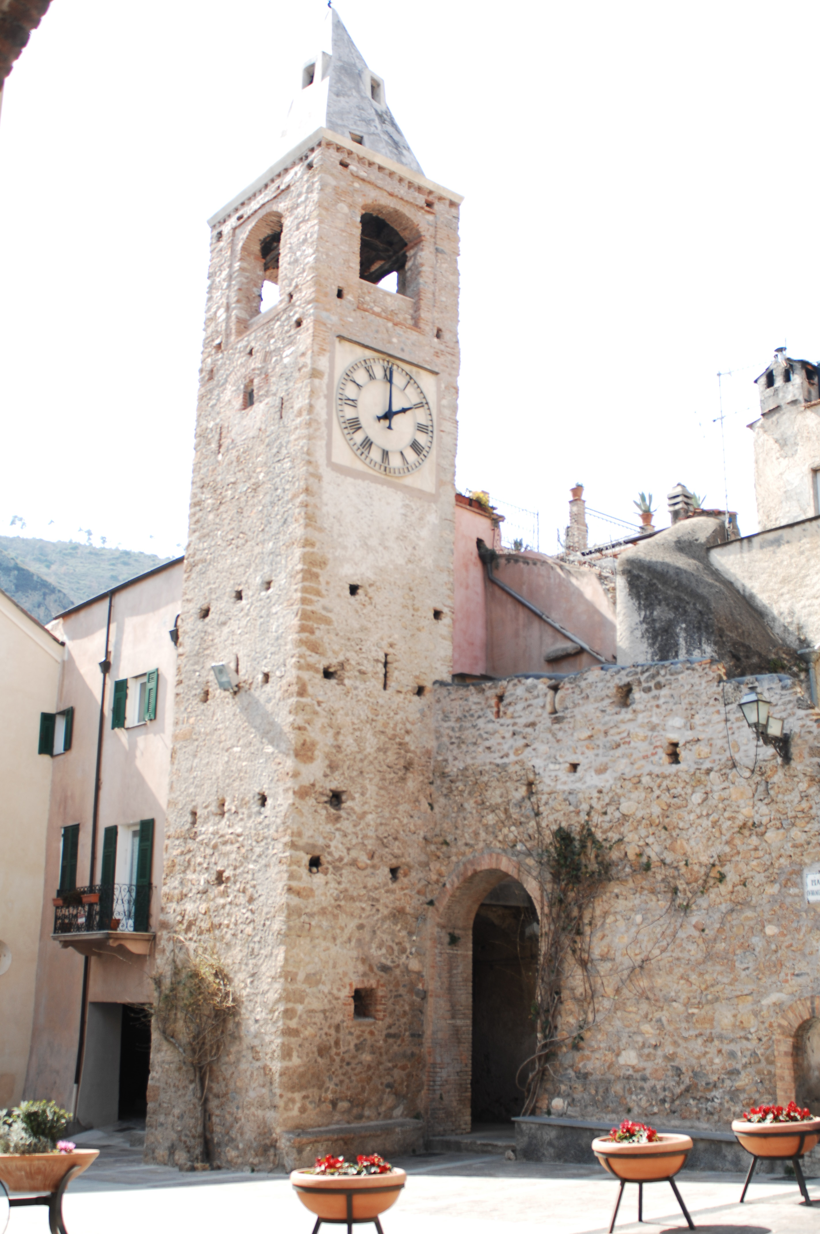 campanile e orologio di Cisano sul Neva